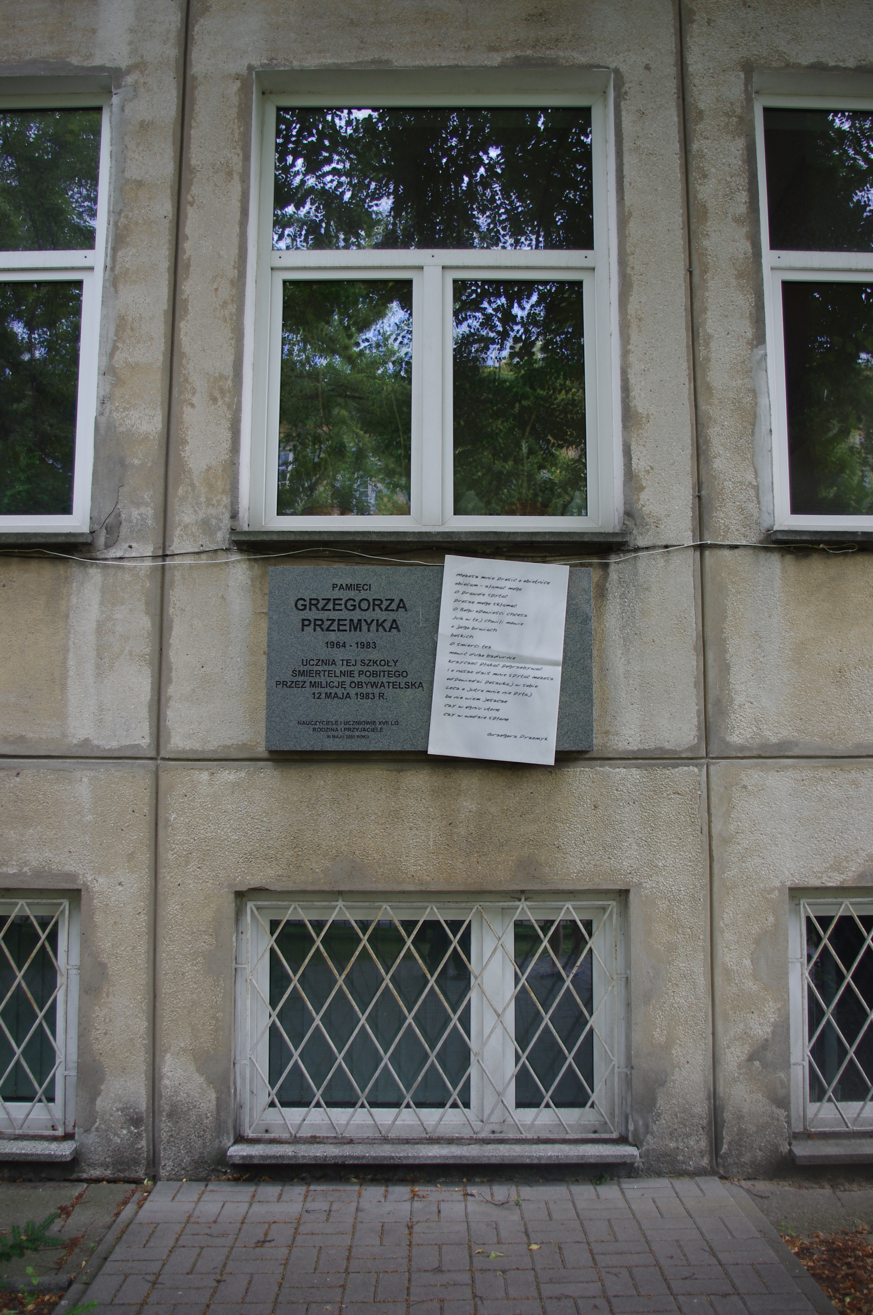 Tablica upamiętniająca Grzegorza Przemyka na budynku XVII LO im. A. Frycza Modrzewskiego w Warszawie przy ul. Elektoralnej 5/7. Tablicę odsłonięto w czerwcu 2003 r., w 20. rocznicę śmierci Przemyka. Na tablicy zamieszczono jego wiersz Gra w szczerość z tomiku "Oko".